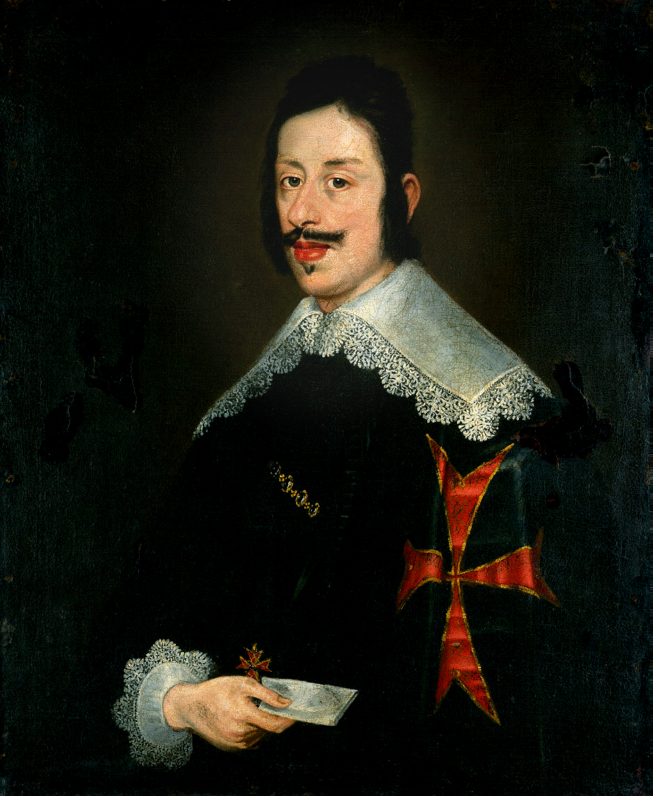 Portrait von Ferdinando II de' Medici, Großherzog von Toskana. Öl auf Leinwand. 90 x 74 cm